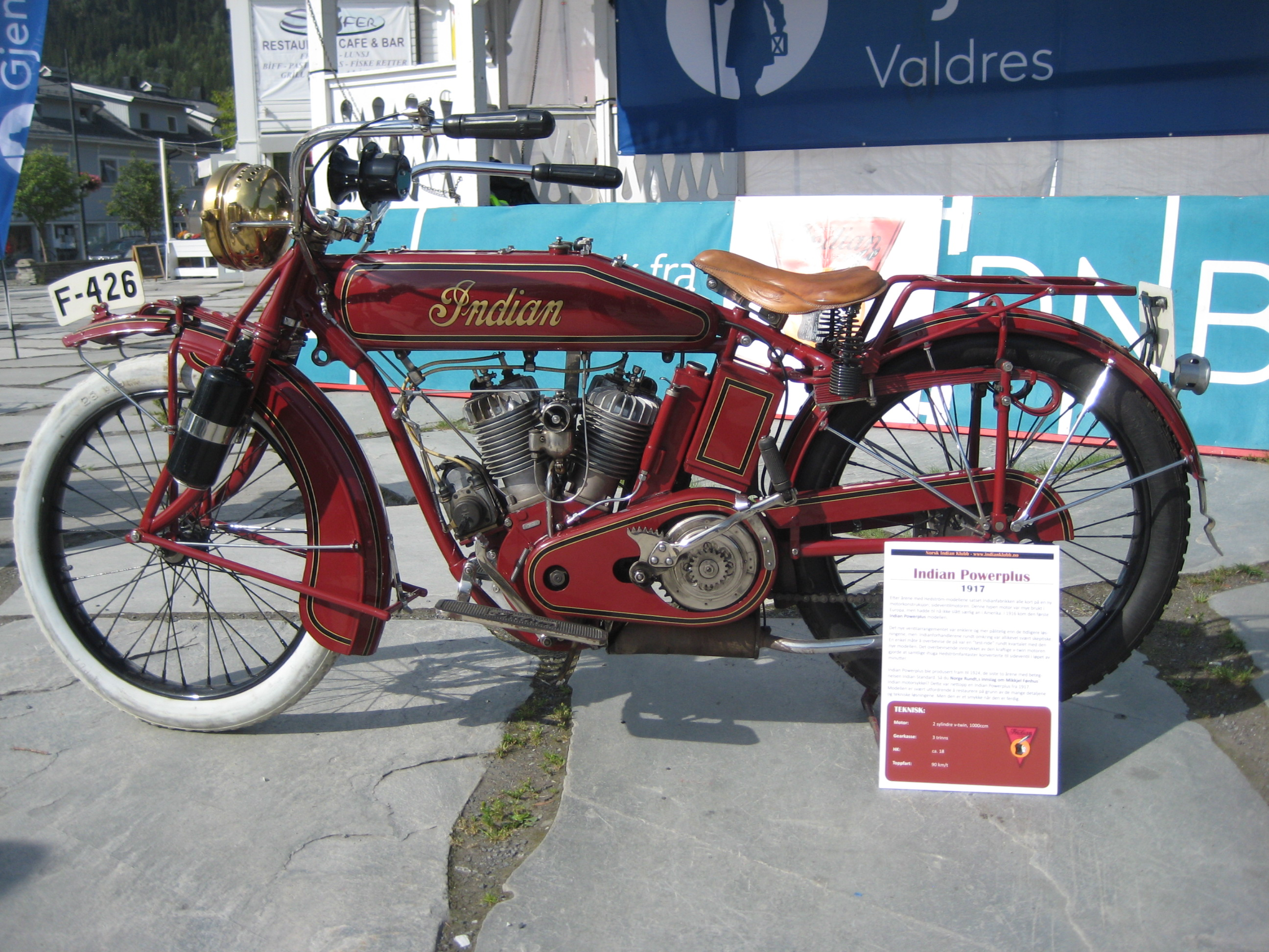 Indian Powerplus 1917. Indian Summer Meet. Fagernes, Norway